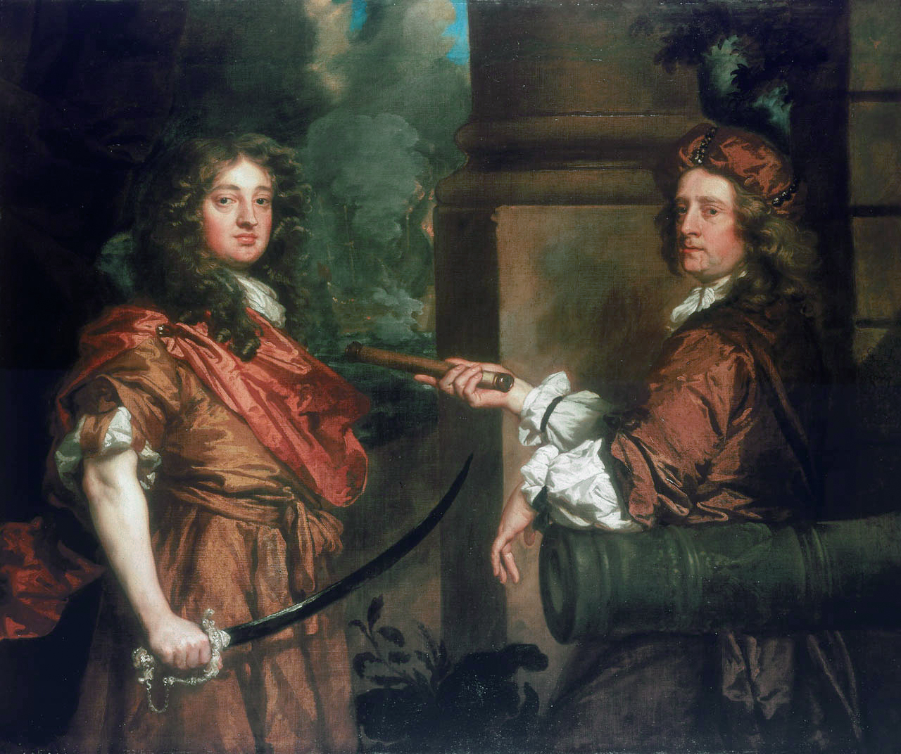 Sir Frescheville Holles, 1641-72, and Sir Robert Holmes, 1622-92